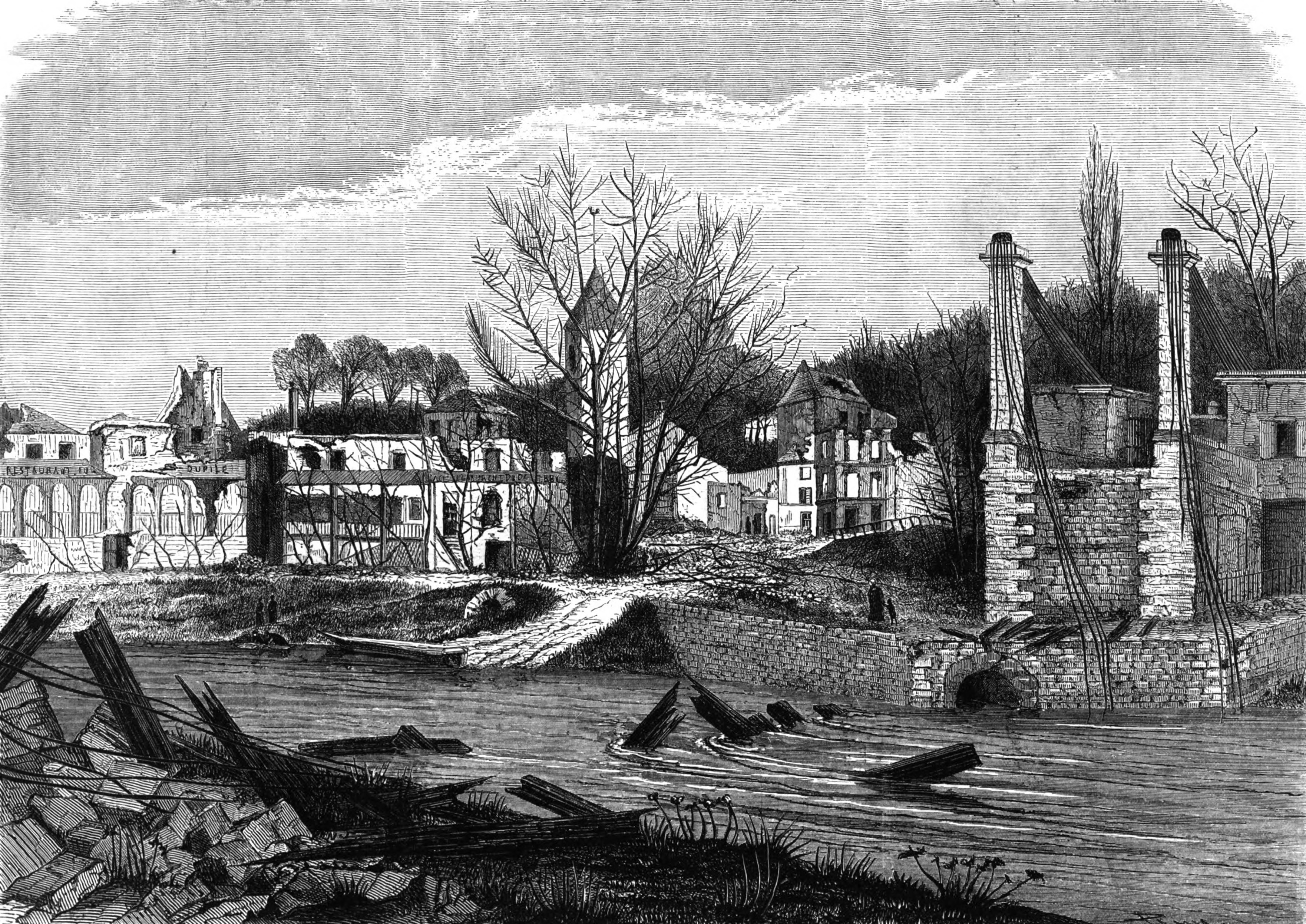 Petit-Bry , sur Marne , près Paris ( Stephane)